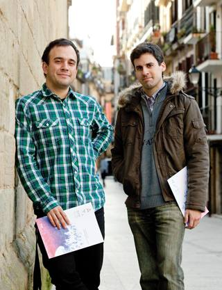 Ibai Gandiaga eta Unai Fernandez de Betoño. Aldiri aldizkariaren arkitekto sustatzaileak. (2010)